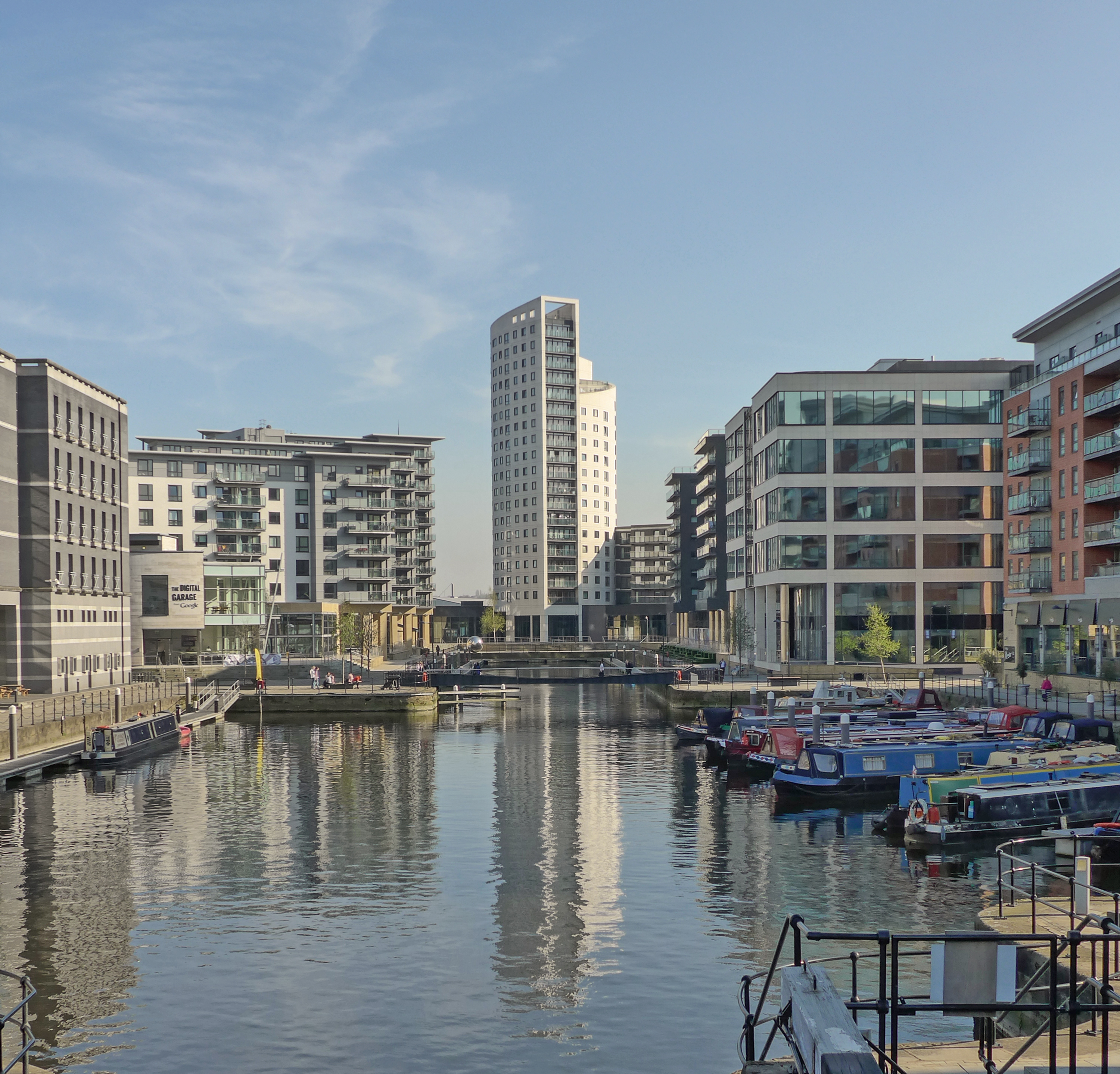 Leeds Dock